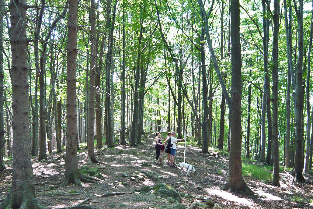 Lokalita hradu Šaumburk